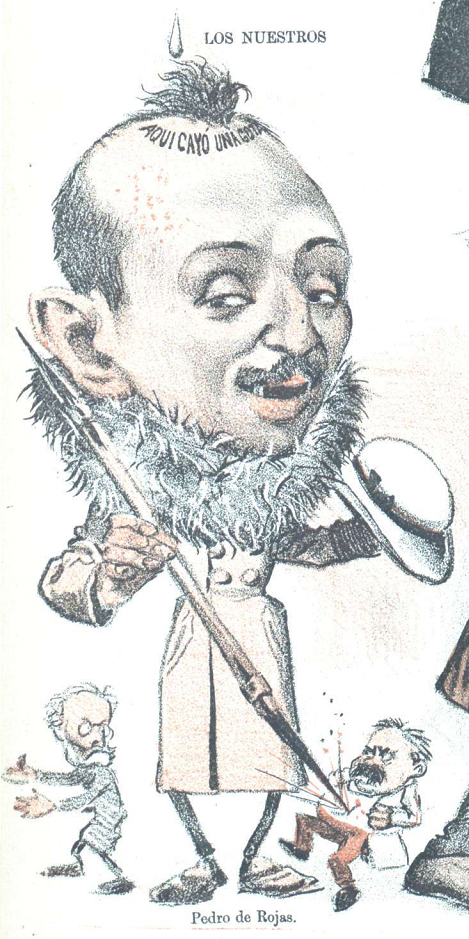 Caricatura.